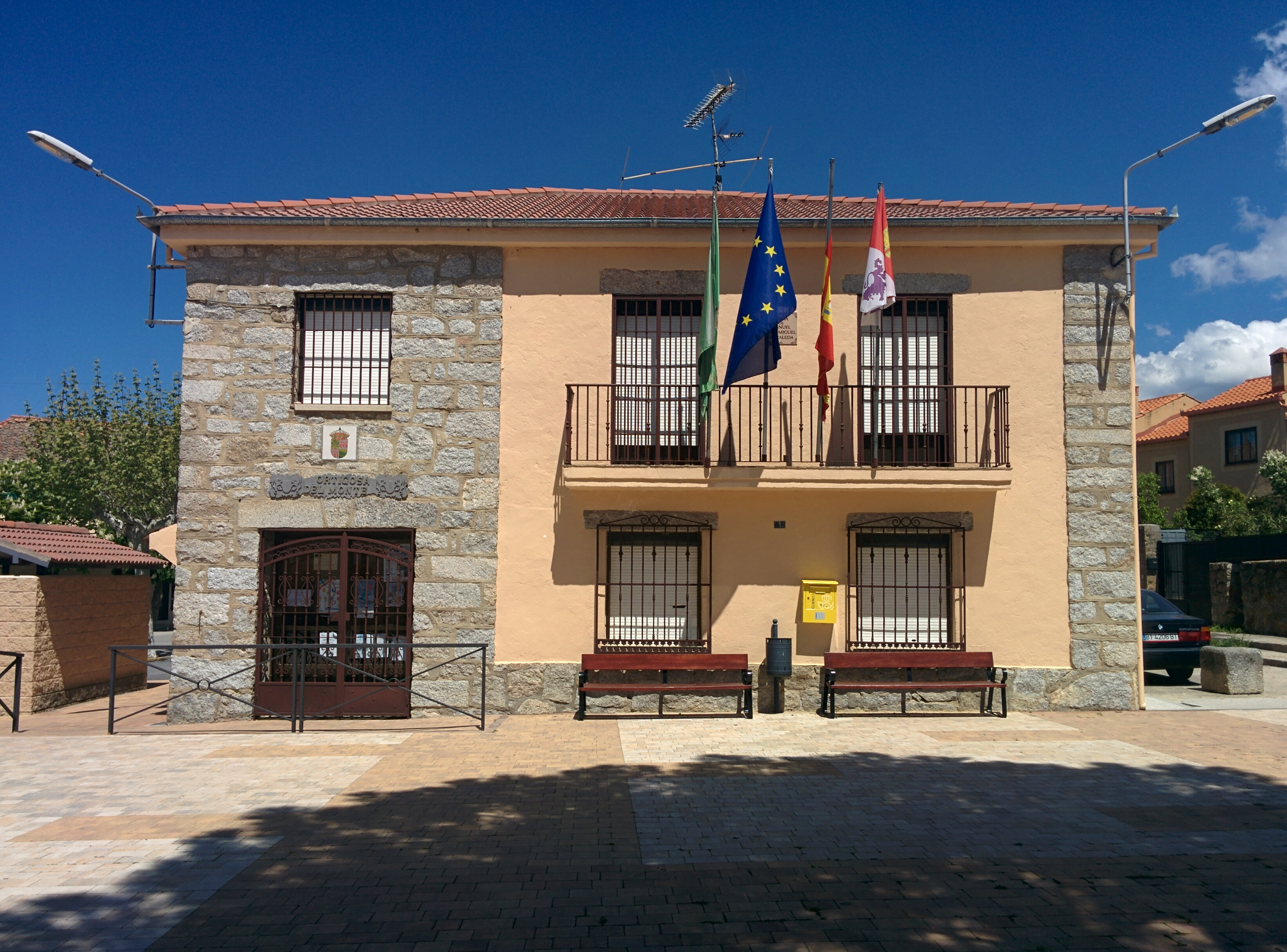 Casa consistorial de Ortigosa del Monte (Segovia, España).